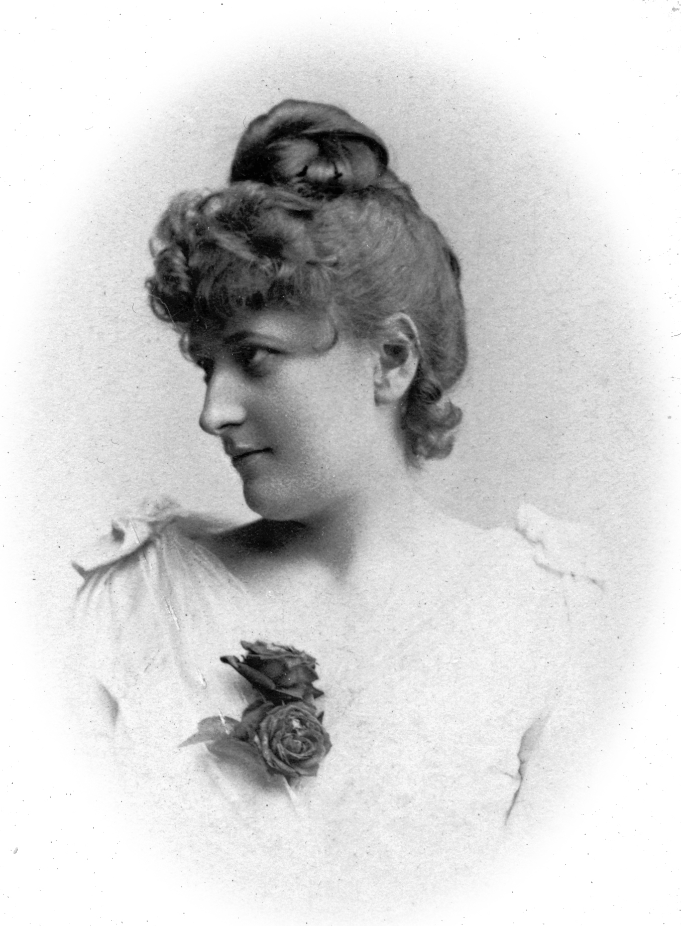 Märta Petrini, operasångare. Odaterat porträtt